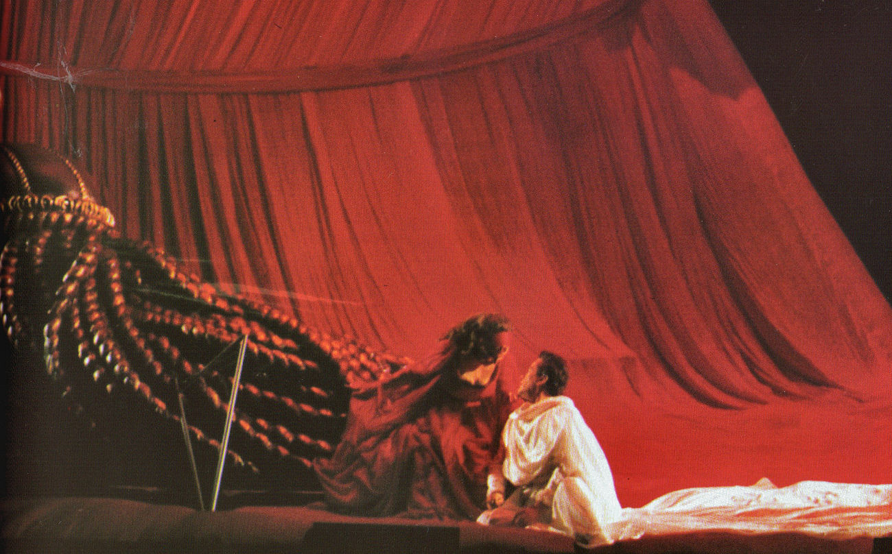 Tannhäuser (Wagner), Teatro de la Maestranza de Sevilla 1997. Werner Herzog.